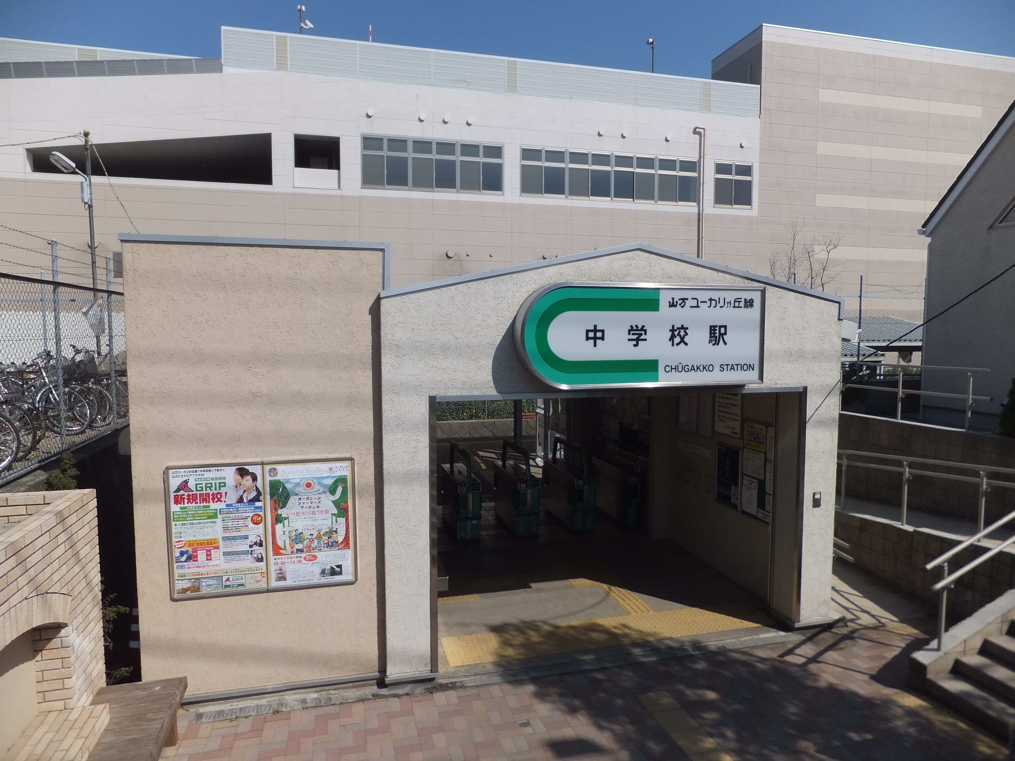 山万ユーカリが丘線中学校駅駅舎